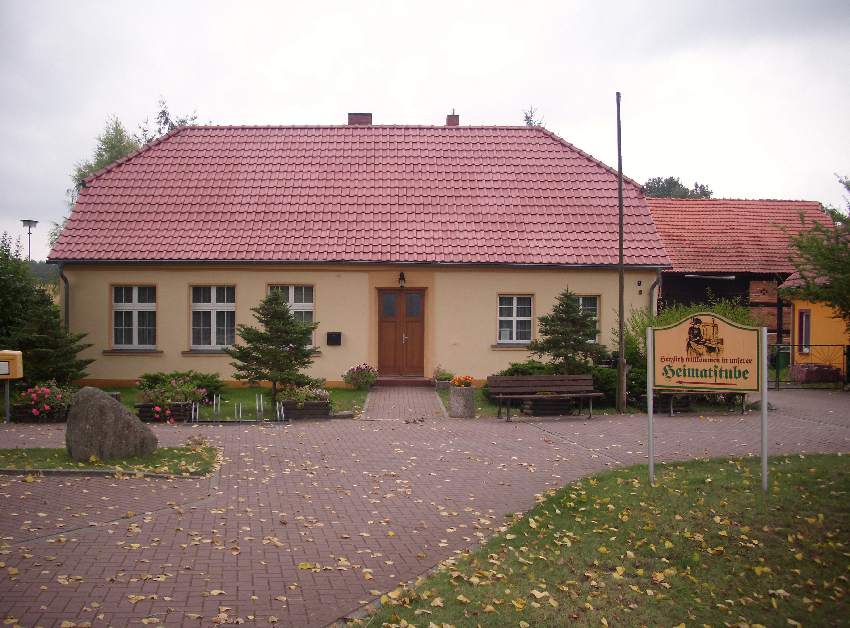 Heimatstube in Schernsdorf, Siehdichum, Brandenburg